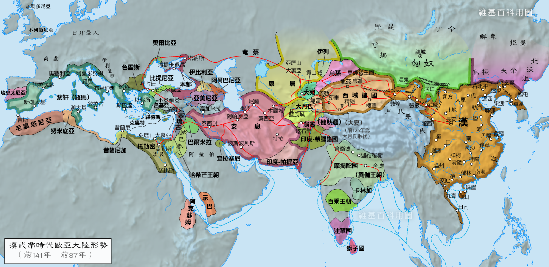 汉武帝时代欧亚大陆形势